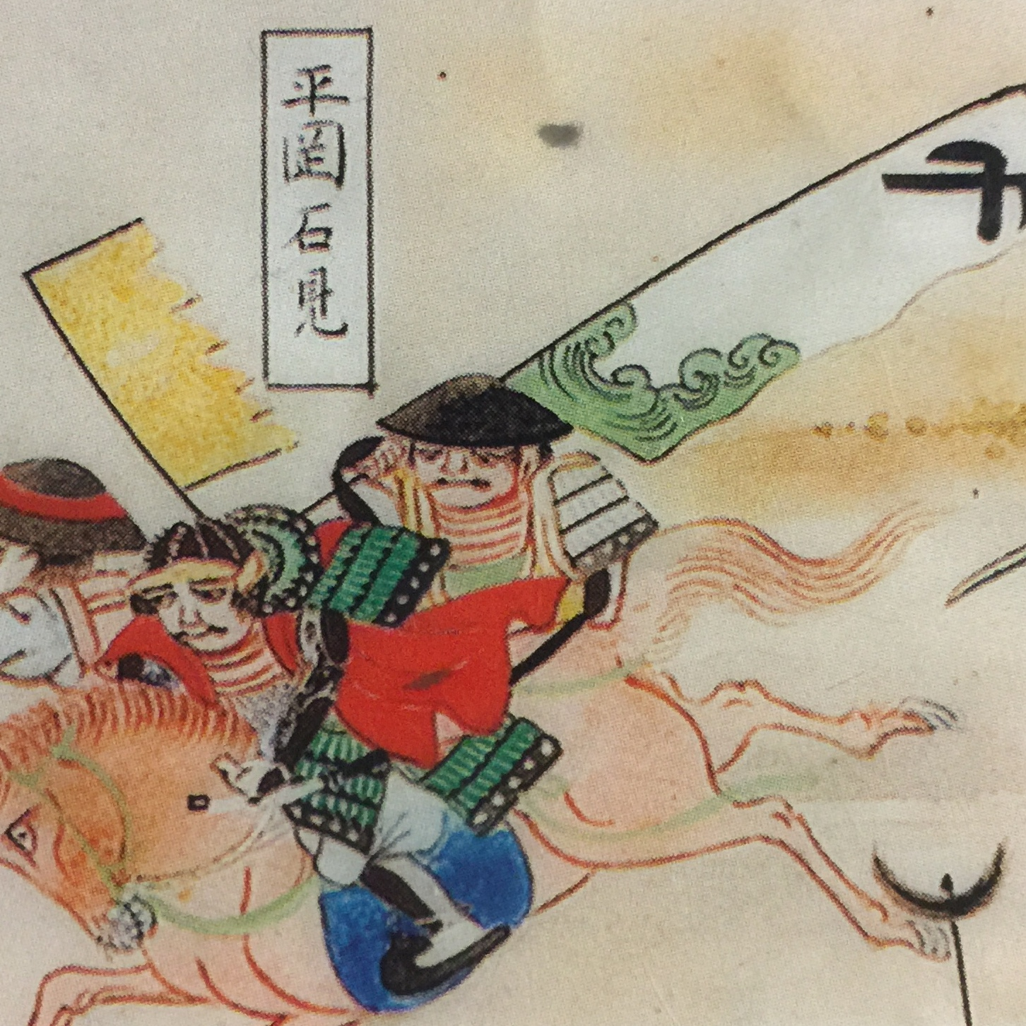 関ヶ原合戦図屏風（関ケ原町歴史民俗資料館本）に描かれた、小早川秀秋家臣の平岡石見守（頼勝）。